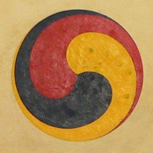 Buk, Korean drum.